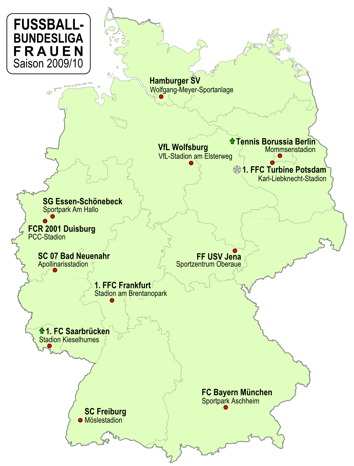 Karte der Vereine der Frauen Fußball-Bundesliga-Saison 2009/2010